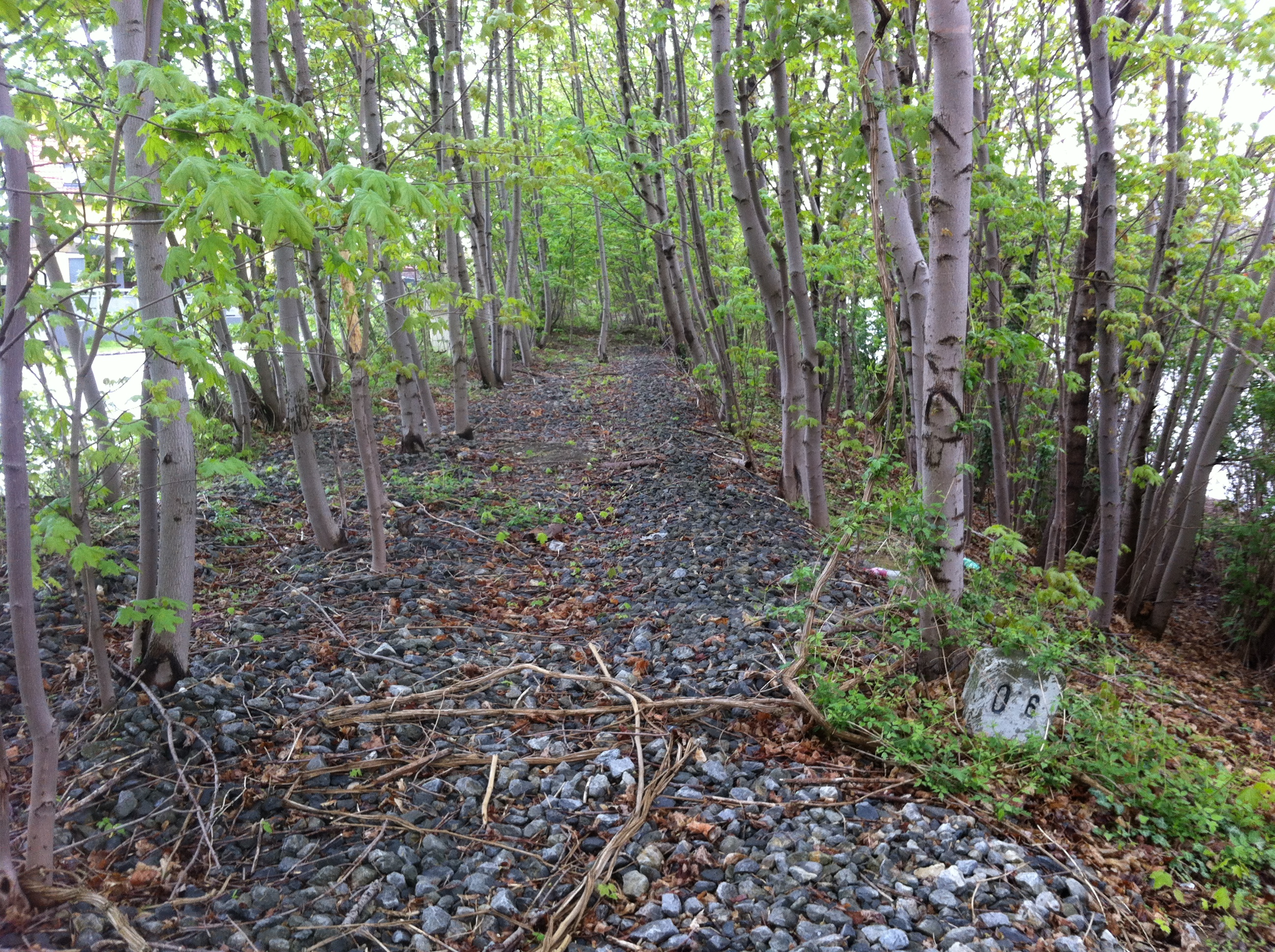 Alte Bahntrasse der Stammersdorfer Lokalbahn